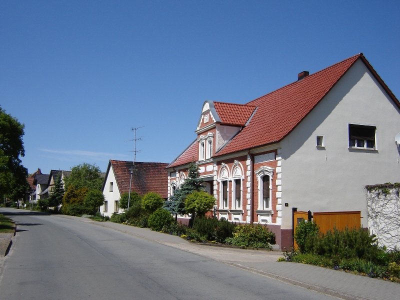 Krüssau, Sachsen-Anhalt, Dorfstraße